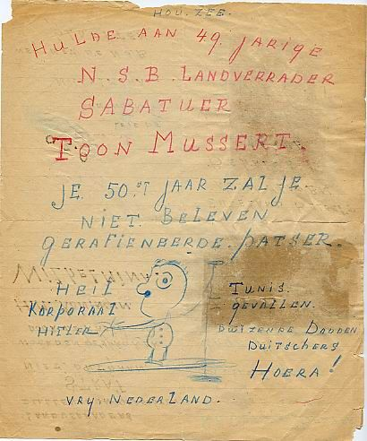 Scheldbrief gericht aan Anton Mussert, de leider van de NSB, met een dreiging over de dood van Mussert en Hitler. Tijdens de Tweede Wereldoorlog ontving Mussert regelmatig anonieme dreig- en scheldbrieven van Nederlanders.